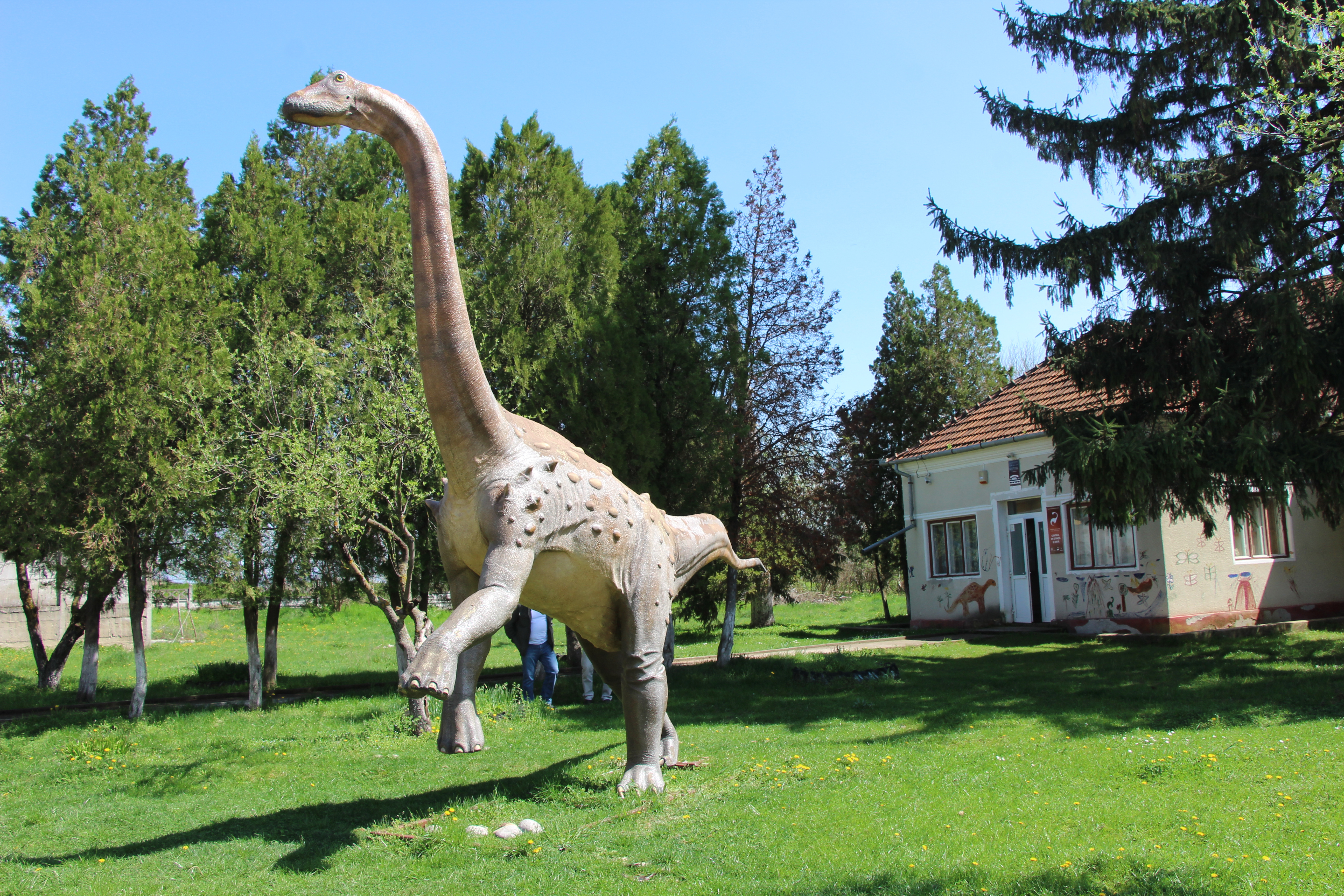 Reconstitution de Magyarosaurus Dacus dans le jardin du centre d'interprétation du village du général Berthelot